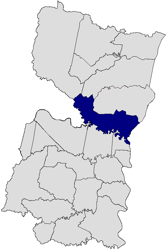 Hernandarias, Alto Paraná